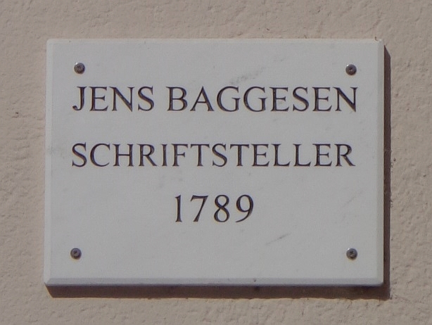 Göttinger Gedenktafel für Jens Baggesen (Weender Straße 13-15)